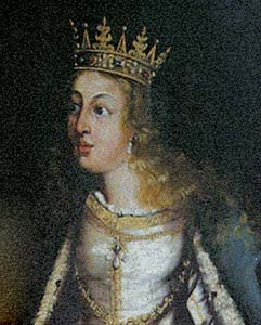 Summary Rainha de Portugal Licensing 19:25, 27 Fevereiro 2006 L Gonçalves 241x300 (34033 bytes) (Rainha de Portugal)